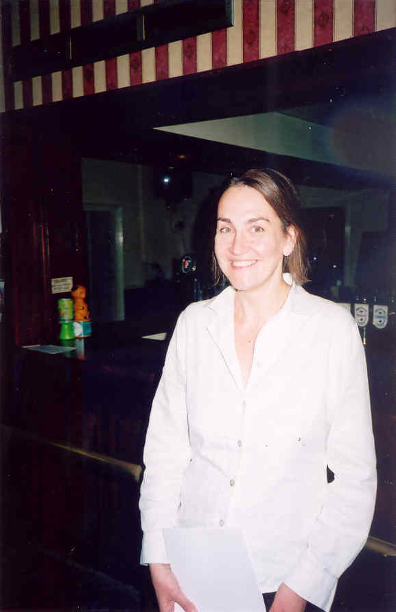 Natascha Engel, deputato labourista britannico.